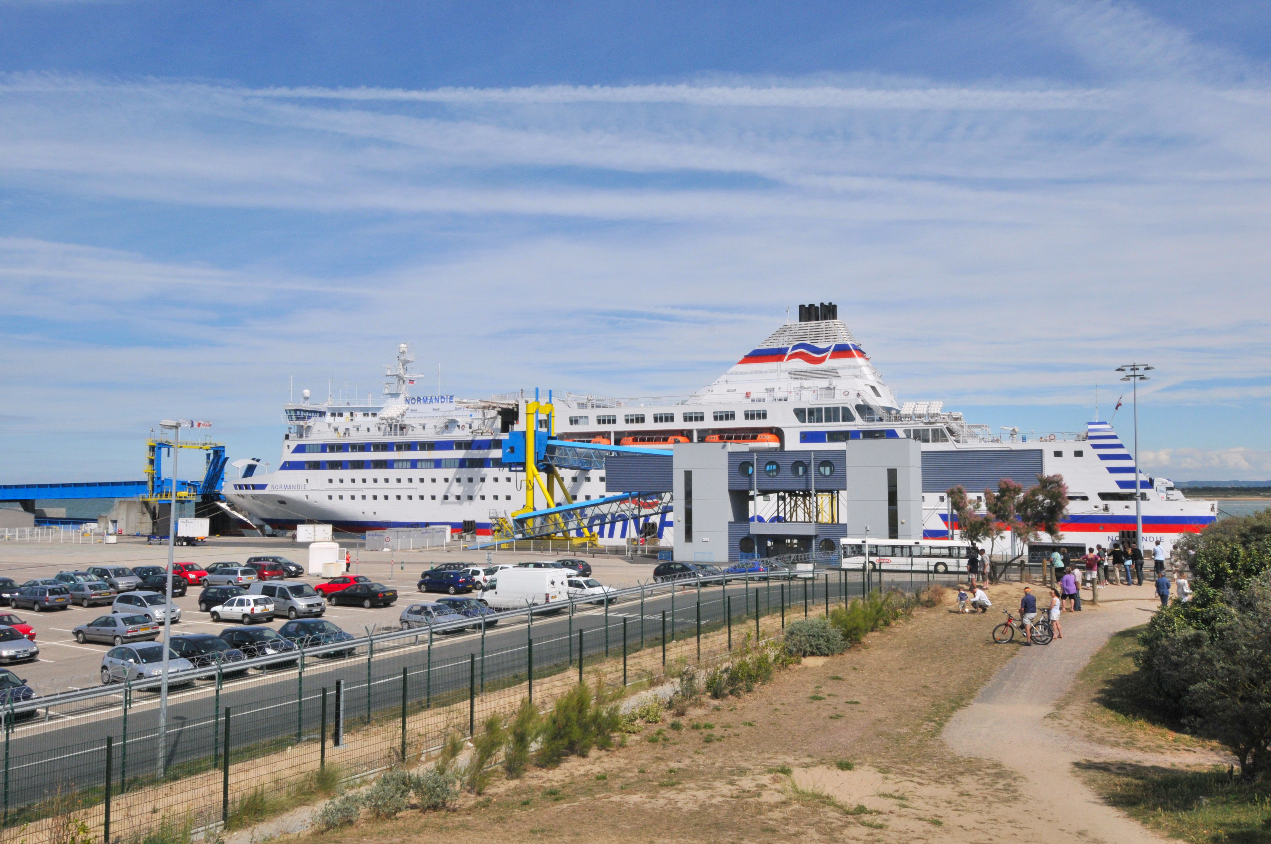 Ouistreham_39.JPG calvados